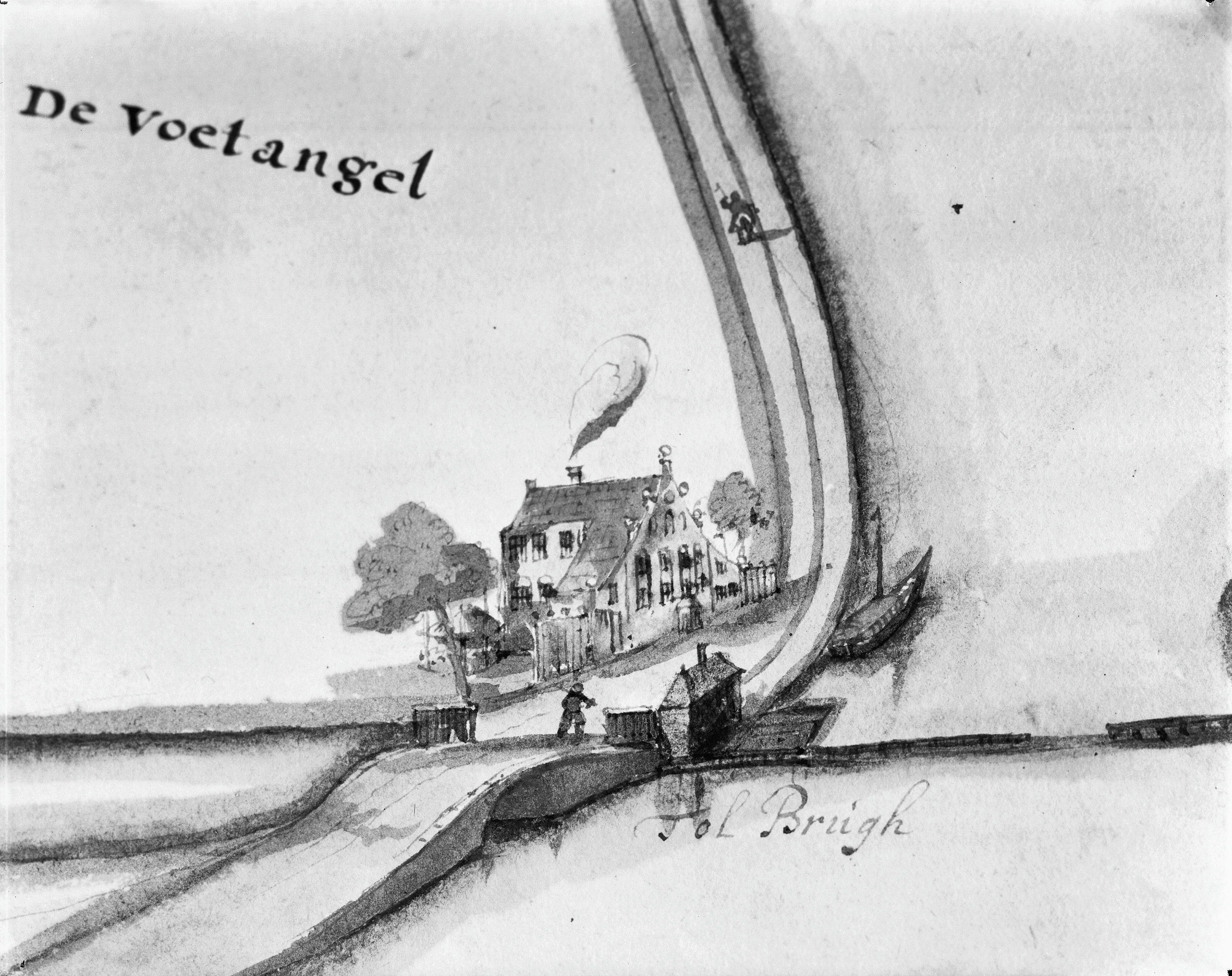 De Voetangel, kaartboek Sint Pietersgasthuis, Gemeente Archief Amsterdam